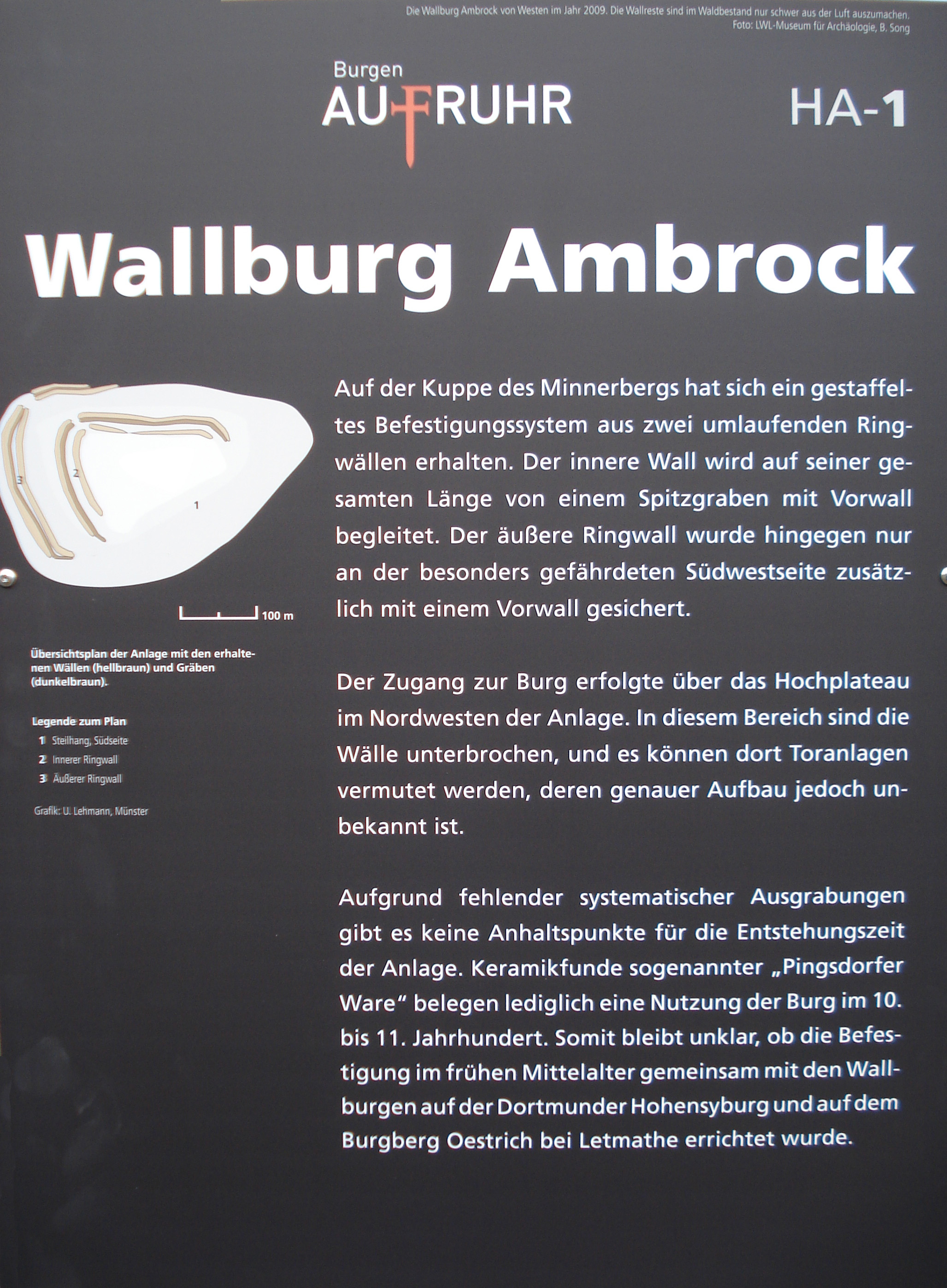 Schautafel an der Wallburg Ambrock, Hagen/Westfalen